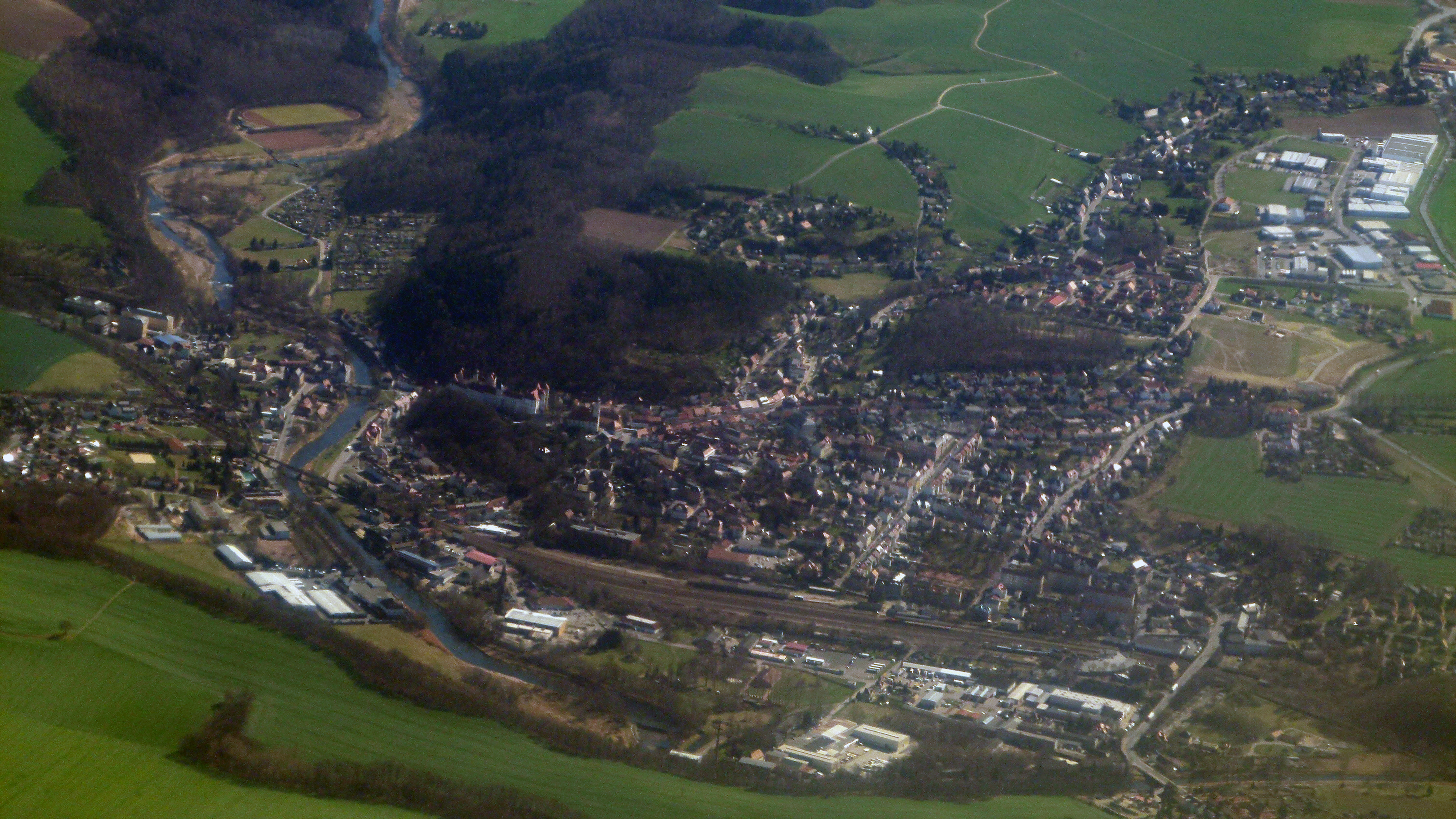 Luftbild von Nossen, Sachsen